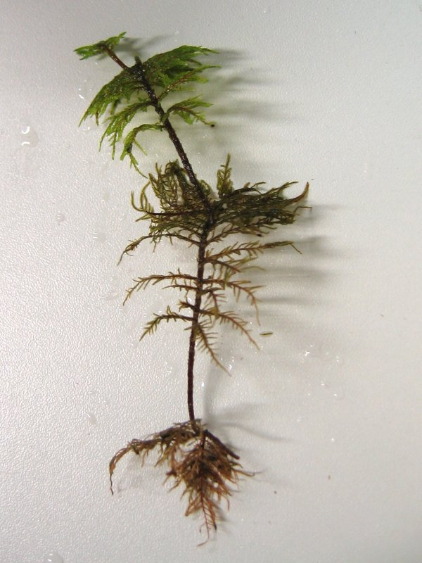 Etagenmoos Hylocomium splendens, Rostock